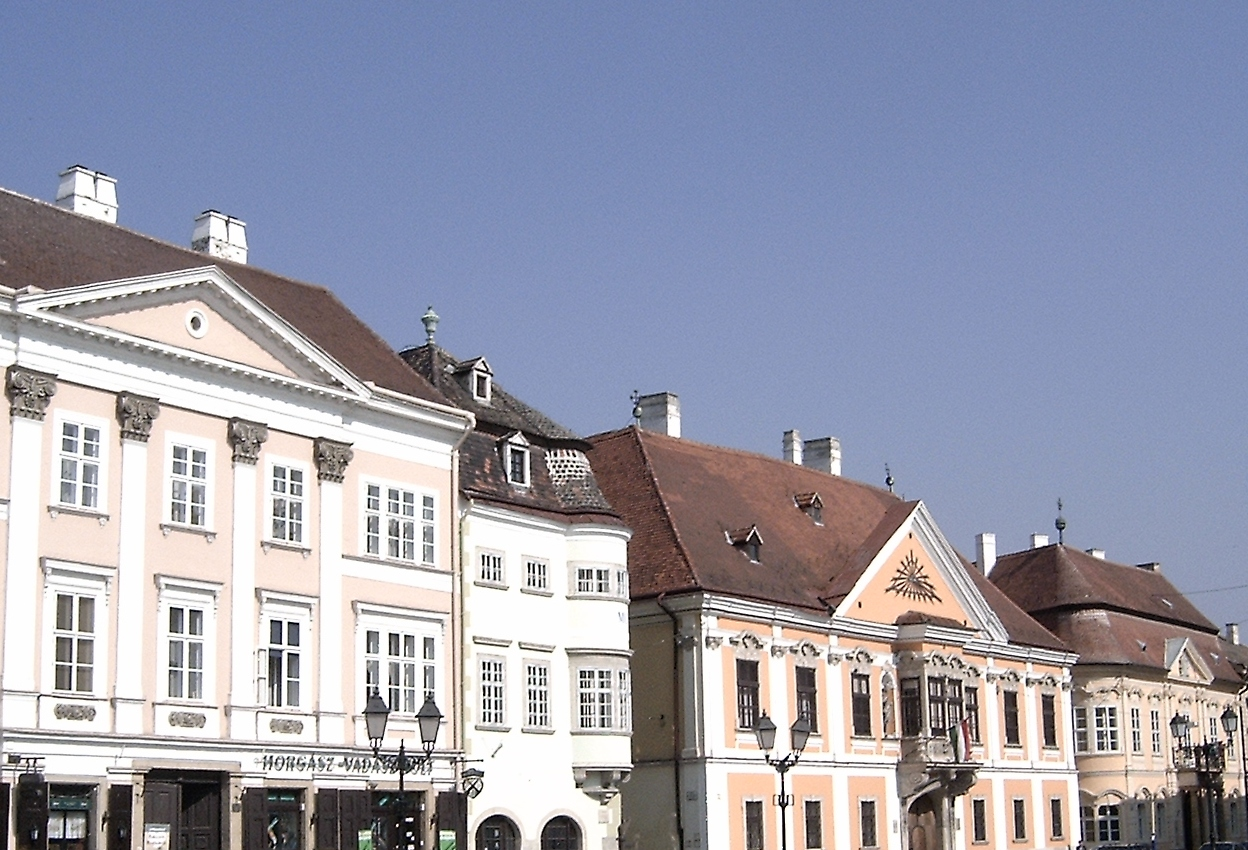 A győri Széchenyi tér északi oldalának barokk palotái (Győr-Moson-Sopron megye)